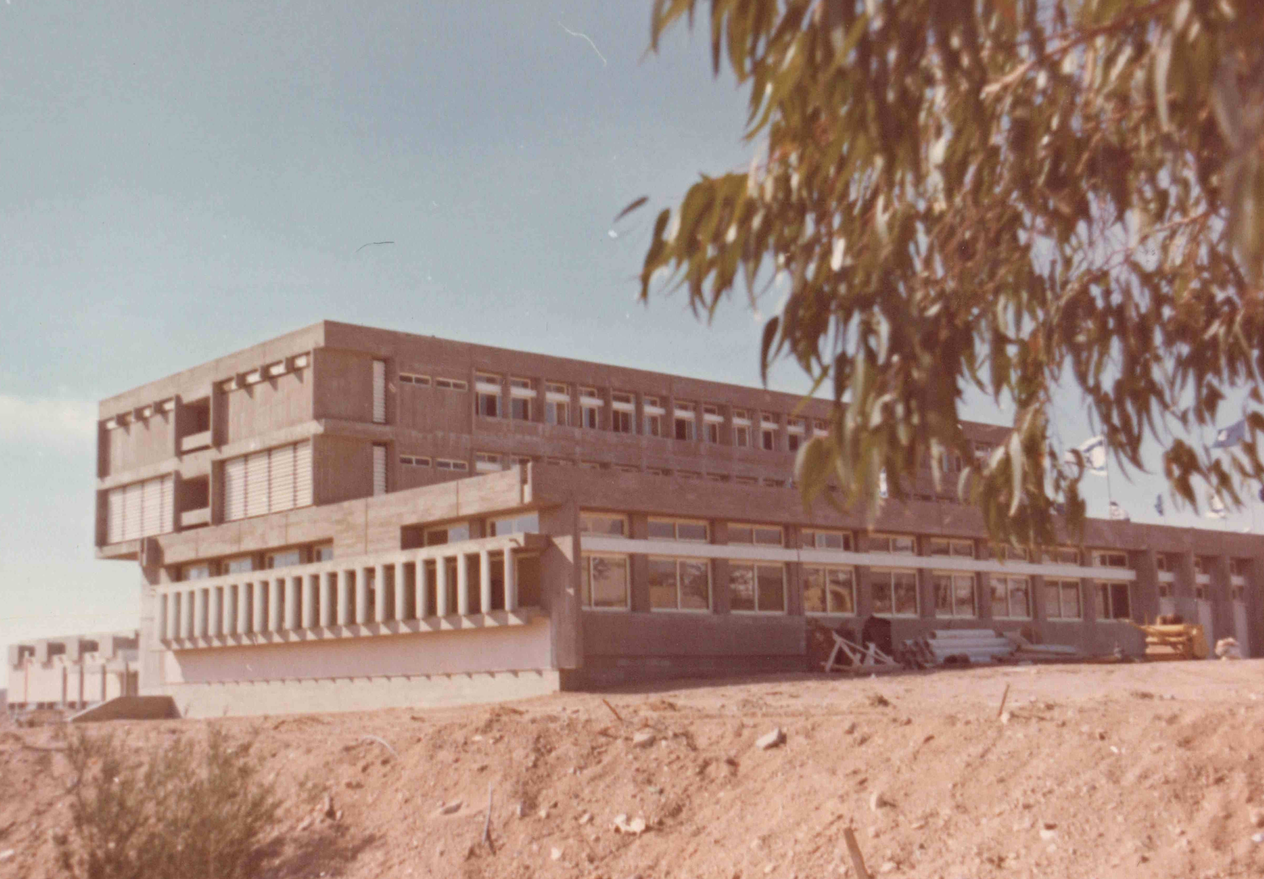 בית הספר המקיף גולווטר באילת - בשלבי הבניה האחרוניים